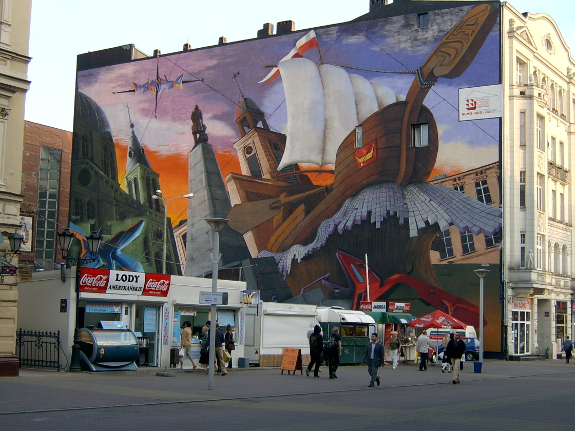 Wandmalerei auf Piotrowska - Wappen von Łódź